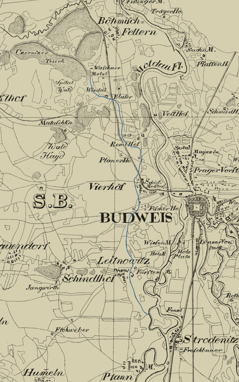 Výřez z historické mapy (1829) se zvýrazněním původního toku Zlaté stoky. Podkladová mapa: „Topographische Karte der in Böhmen budweiser Kreises liegenden Sr. Durchlaucht dem Fürsten zu Schwarzenberg Herzog zu Krummau gehörigen Herrschaft Krummau mit Bestimmung des äussern Gränzen und Ausscheidung des im Umfange der Herrschaft befindlichen obrigkeitlichen Grundeigentums. Nro. II., Joseph Falta, 1829“